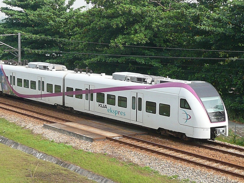 KLIA ekspres passing Salak Selatan station.